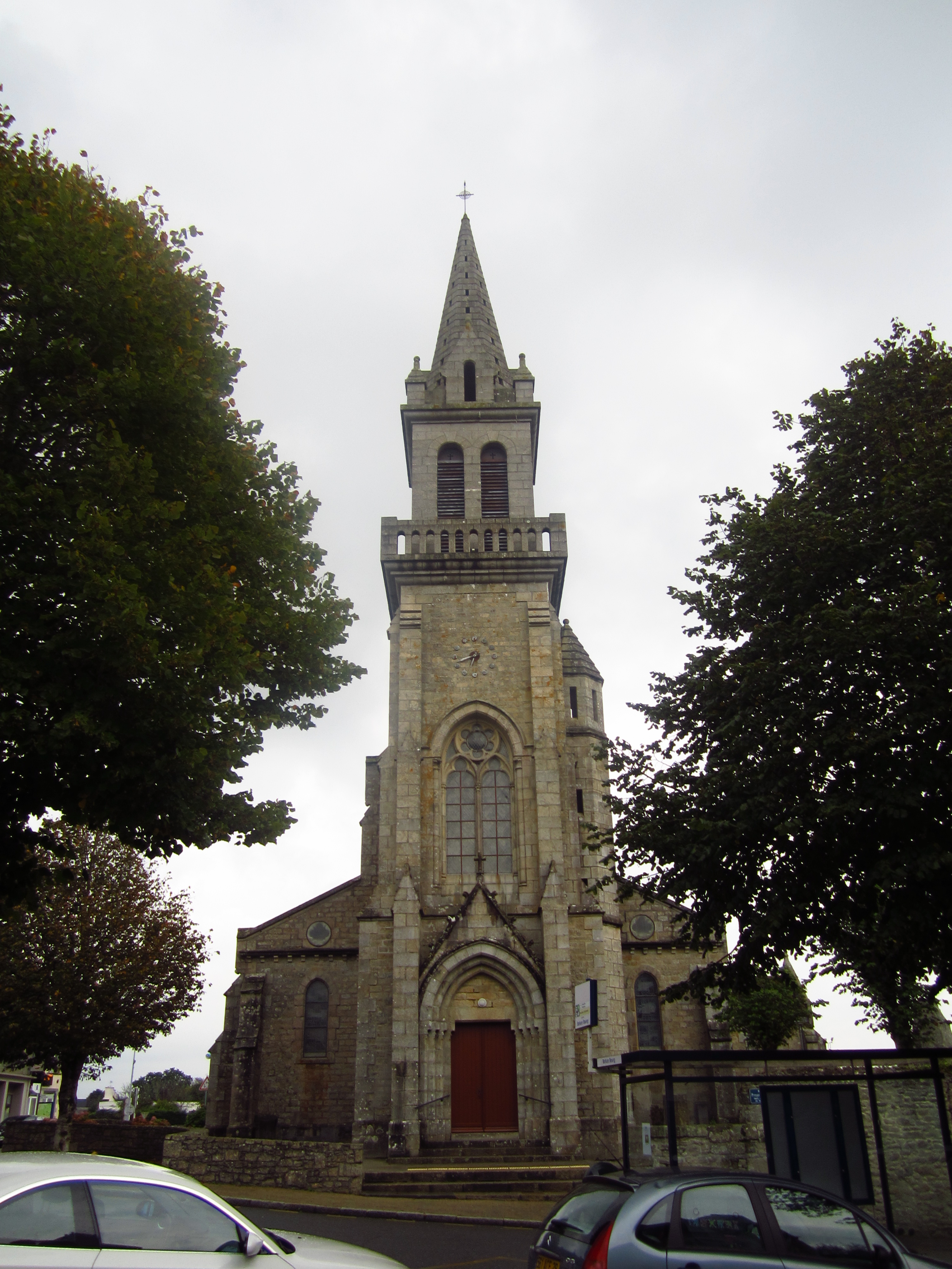 L'église Saint-Pierre-aux-Liens à Bohars dans le Finistère